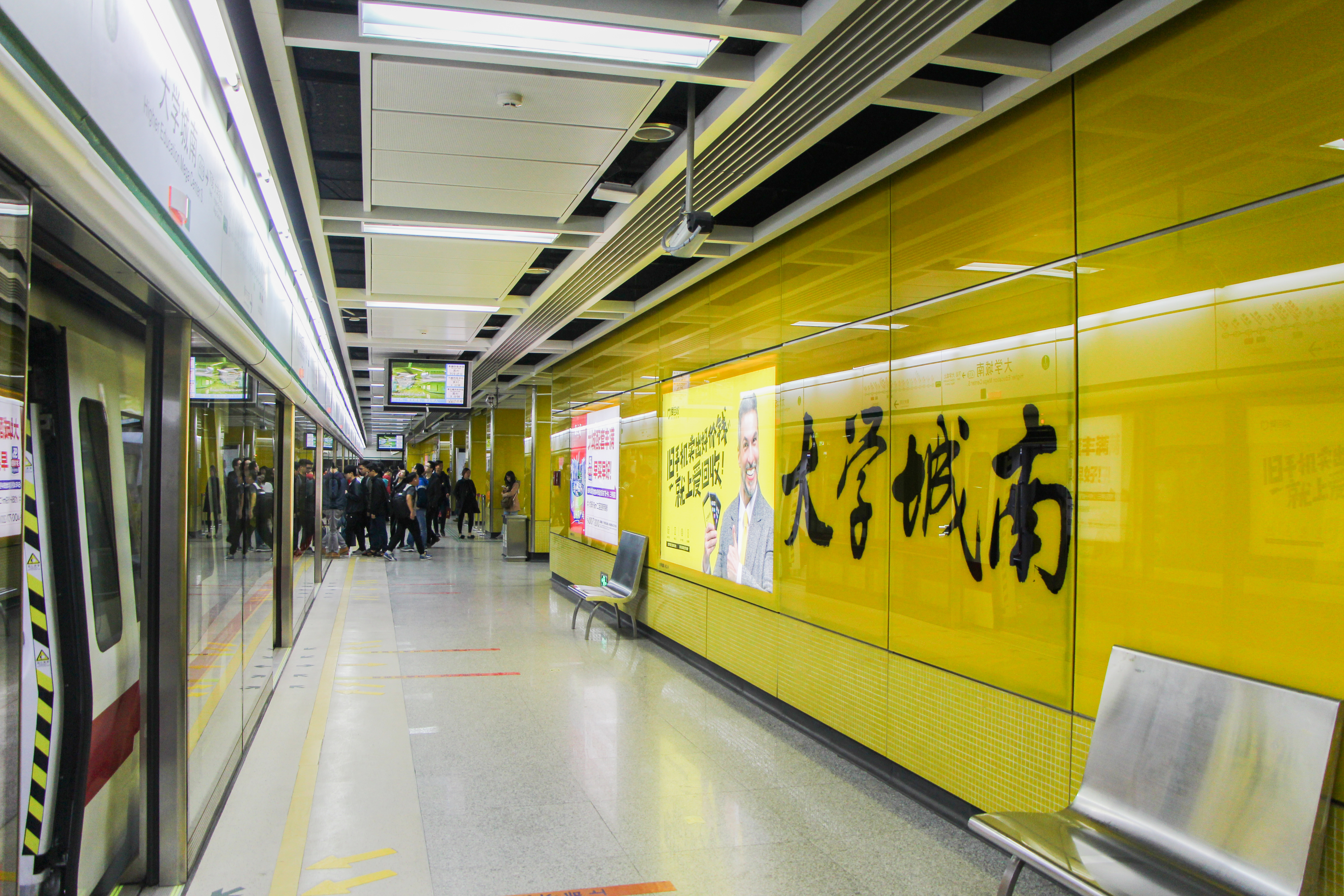 广州地铁大学城南站